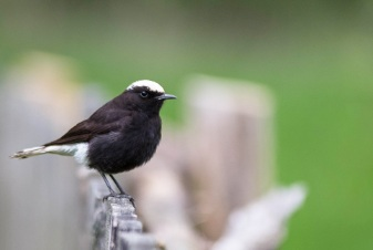 Bialorzytka saharyjska, Winduga, Gmina Bobrowniki, fot ART STUDIO Artur Górczyński, maj 2015.